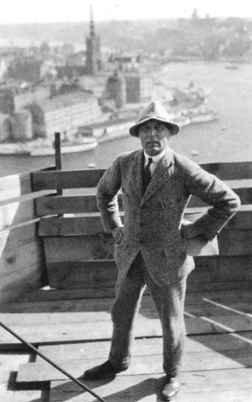 Ragnar Östberg på Stockholms stadshus under byggnadsarbeten, i bakgrunden syns Riddarholmen